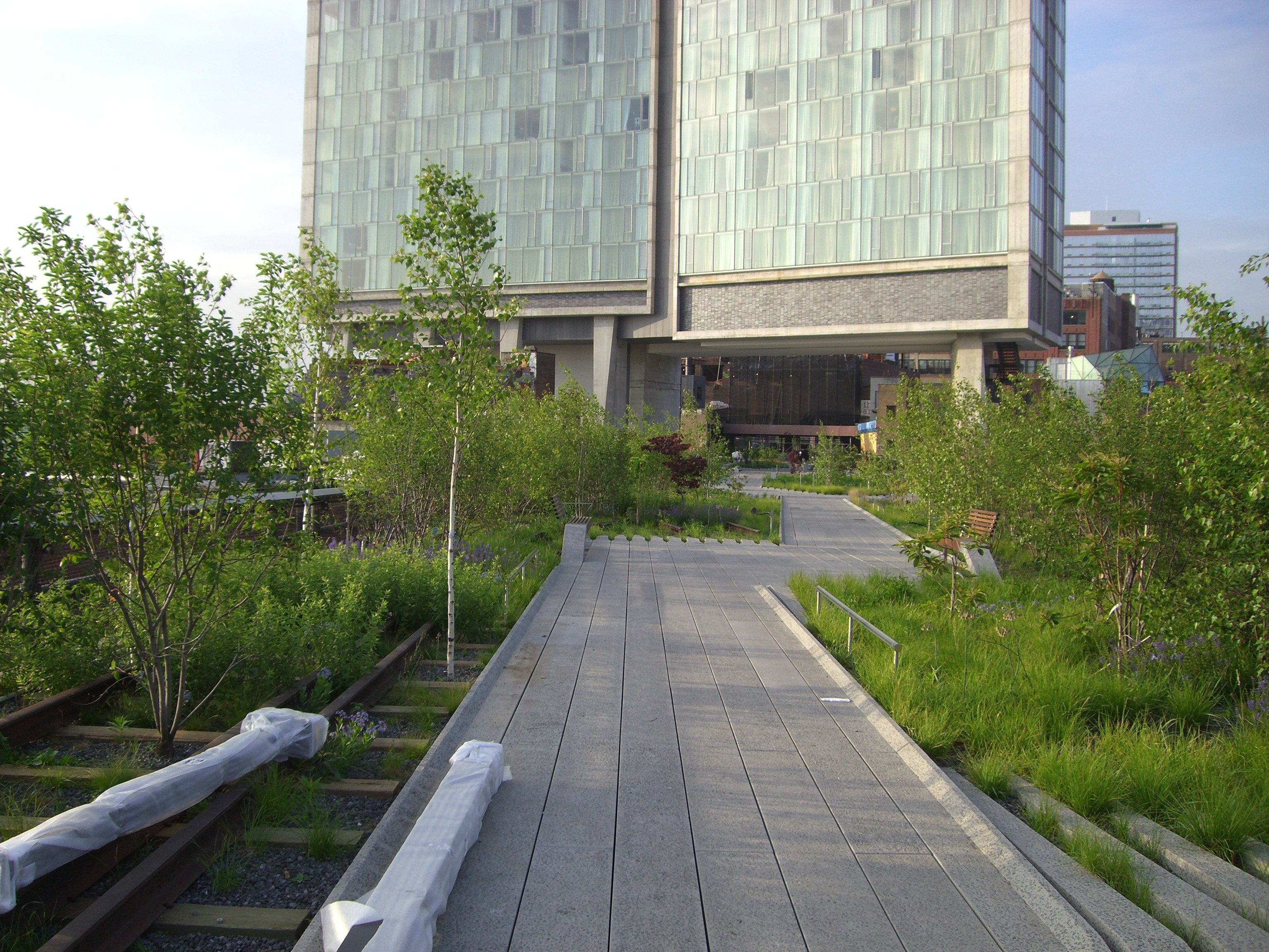 Baustelle High Line Park Mai 2009 kurz vor der Eröffnung des ersten Abschnitts